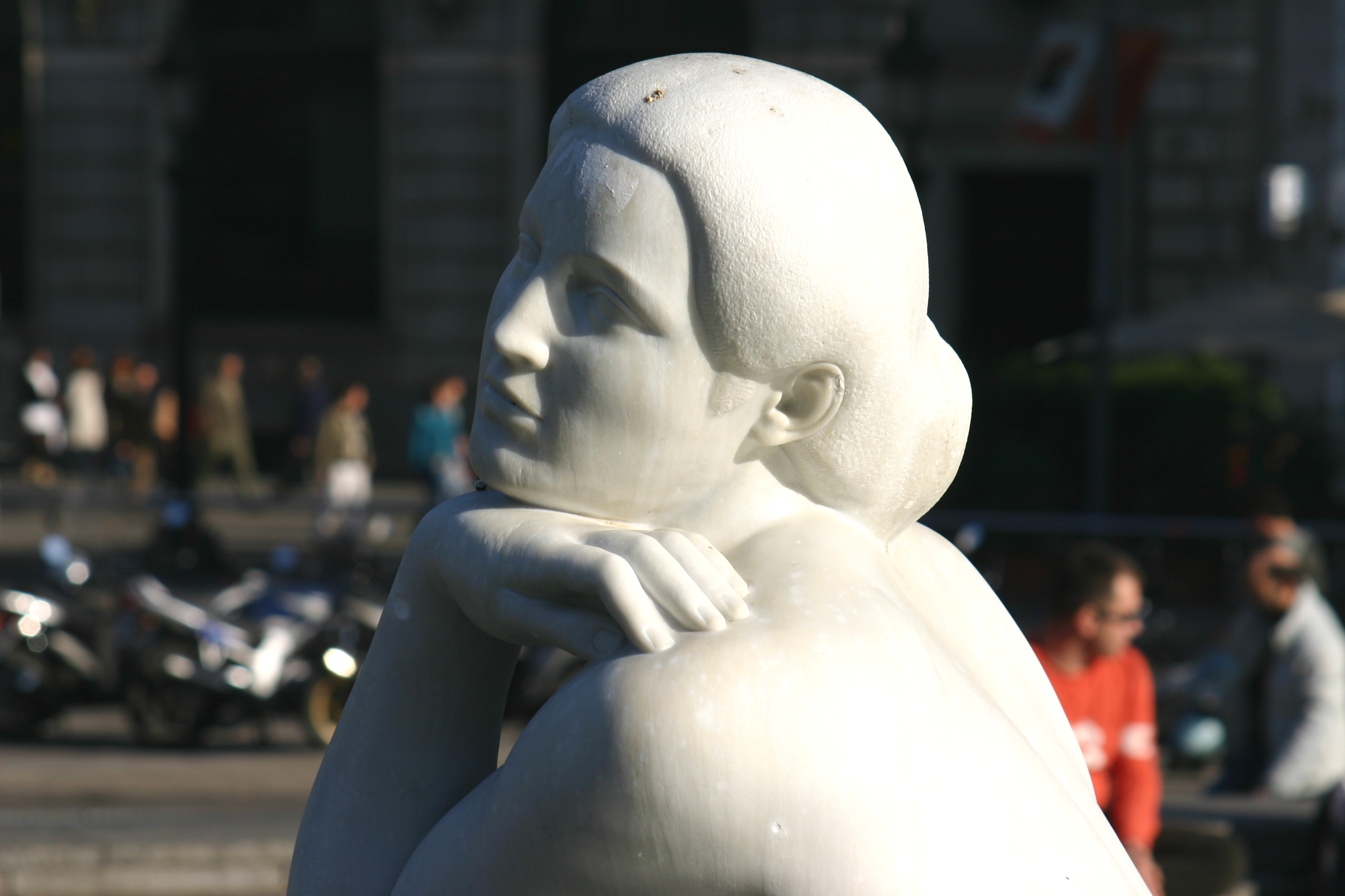 La Deessa o l'Enigma. Plaza Catalunya. Barcelona (Spain)